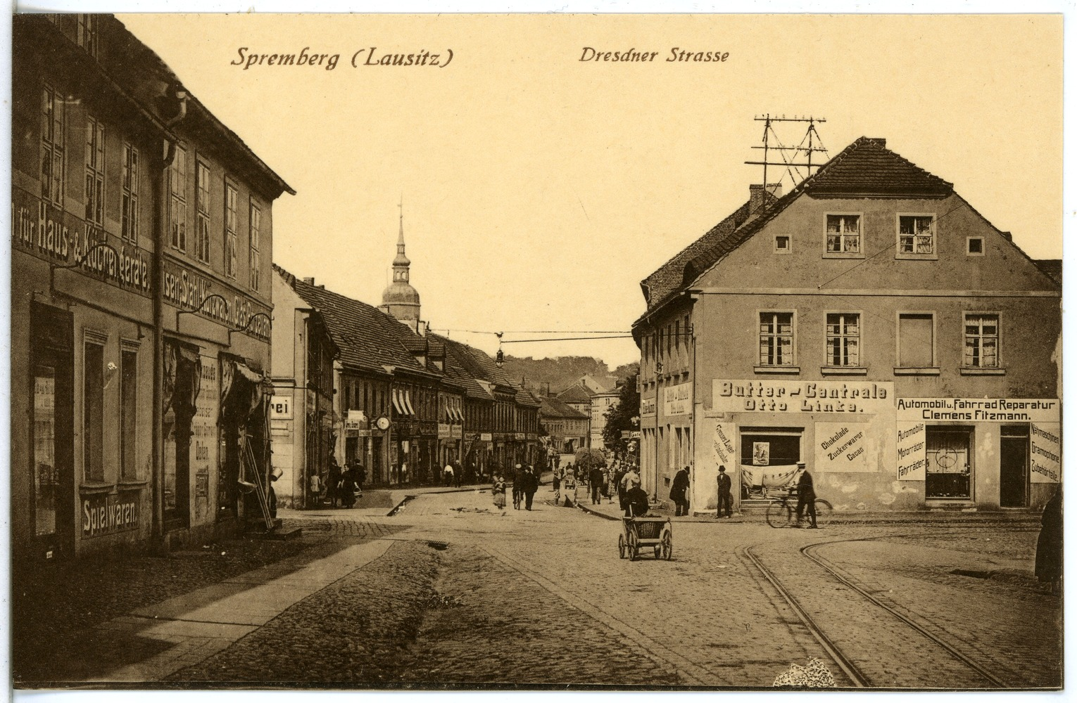 Spremberg; Dresdner Straße This postcard is from publisher Brück & Sohn in Meißen ( postcard has a unique number 20944 and is available in a higher resolution at the publisher. This images was uploaded in a cooperation project between Wikipedians and the publisher.